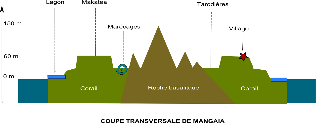 Coupe transversale de Mangaia